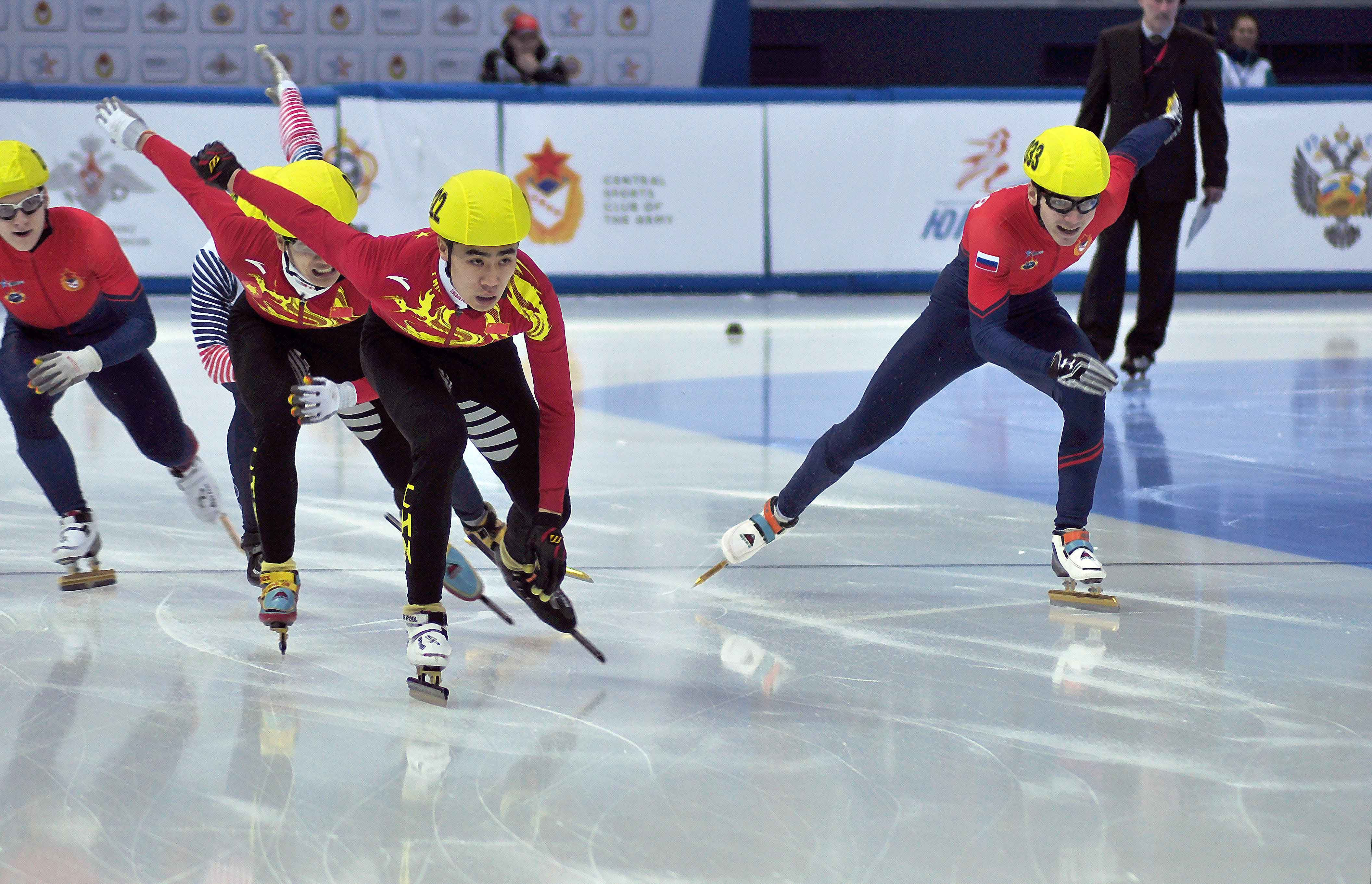 третьи зимние Всемирные военные игры, разное